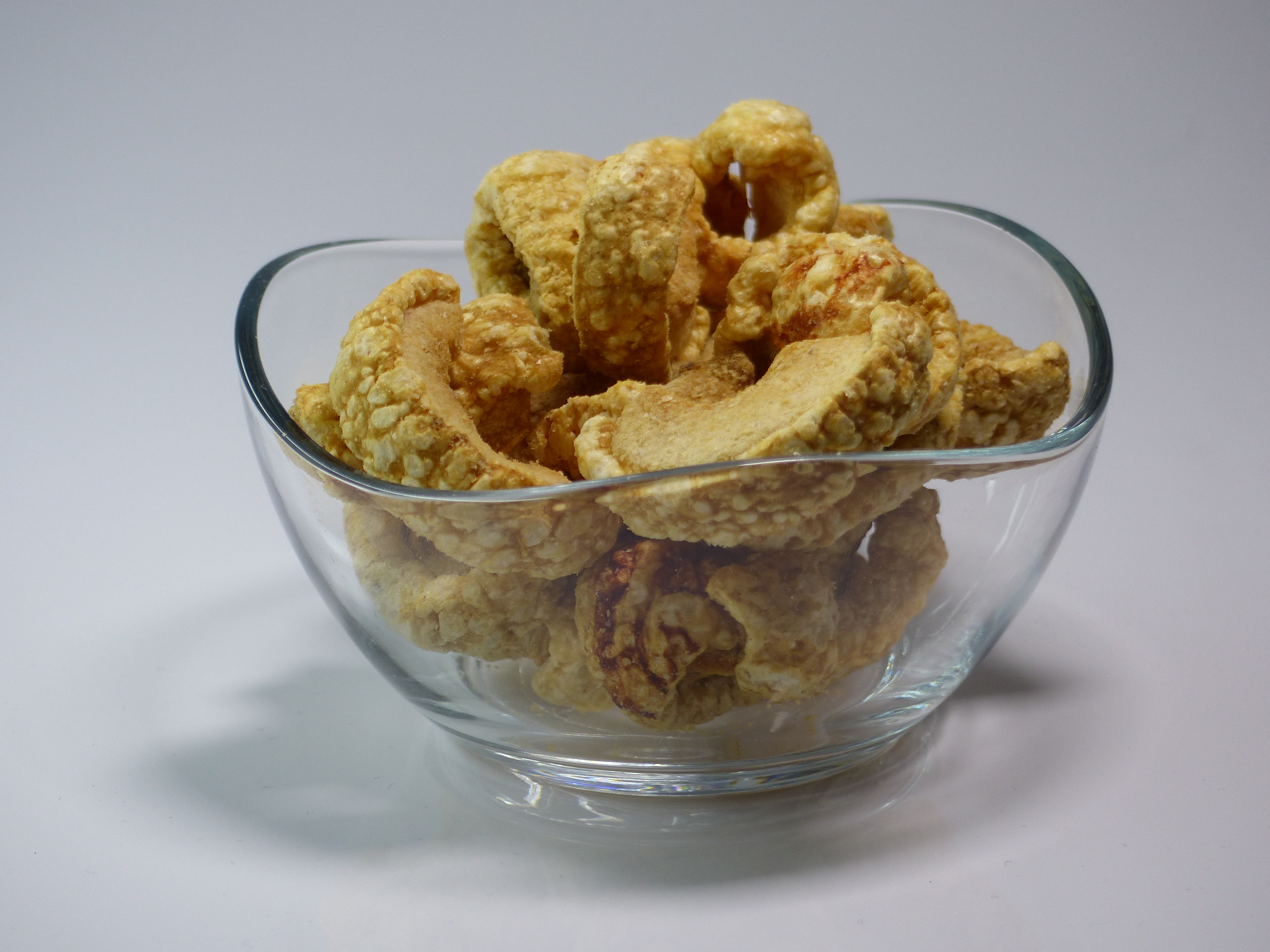 Torreznos